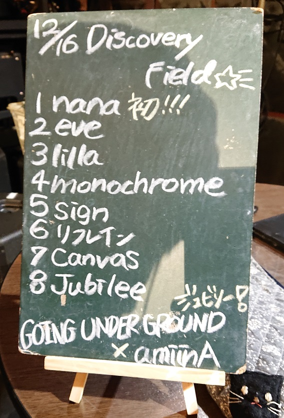 amiinAセトリボード(20181216(1))